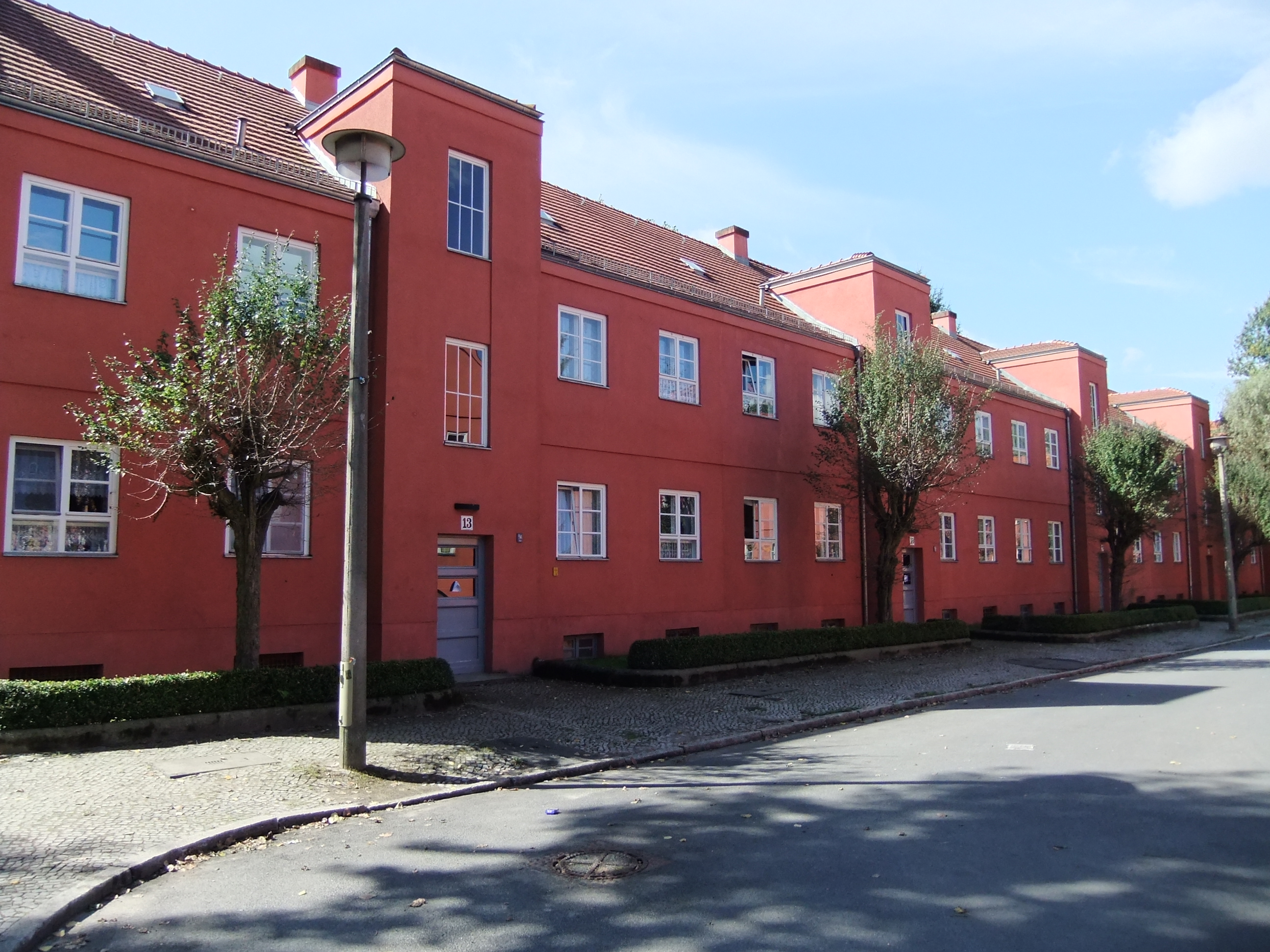 Denkmalliste Berlin OBJ-Dok-Nr.: 09040195 - Berlin Friedrichsfelde Friedenhorster Straße 5-8, Wohnhausgruppe, Großplattenbauweise, 1926-27 von Wilhelm Primke; Vorgärten Ontarioseestraße 2/14 Splanemannstraße 3-10, 11/17, 18-21(Gesamtanlage)